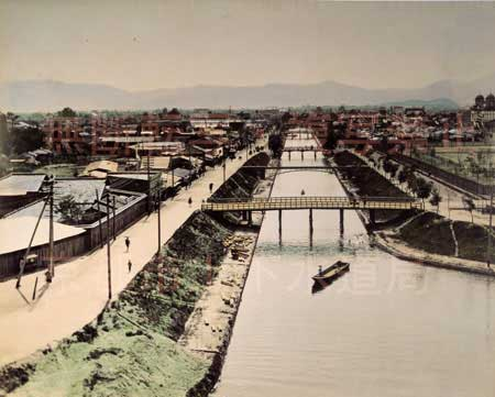 第四回内国勧業博覧会開催時の鴨東運河。1895年、桑田正三郎氏による撮影。